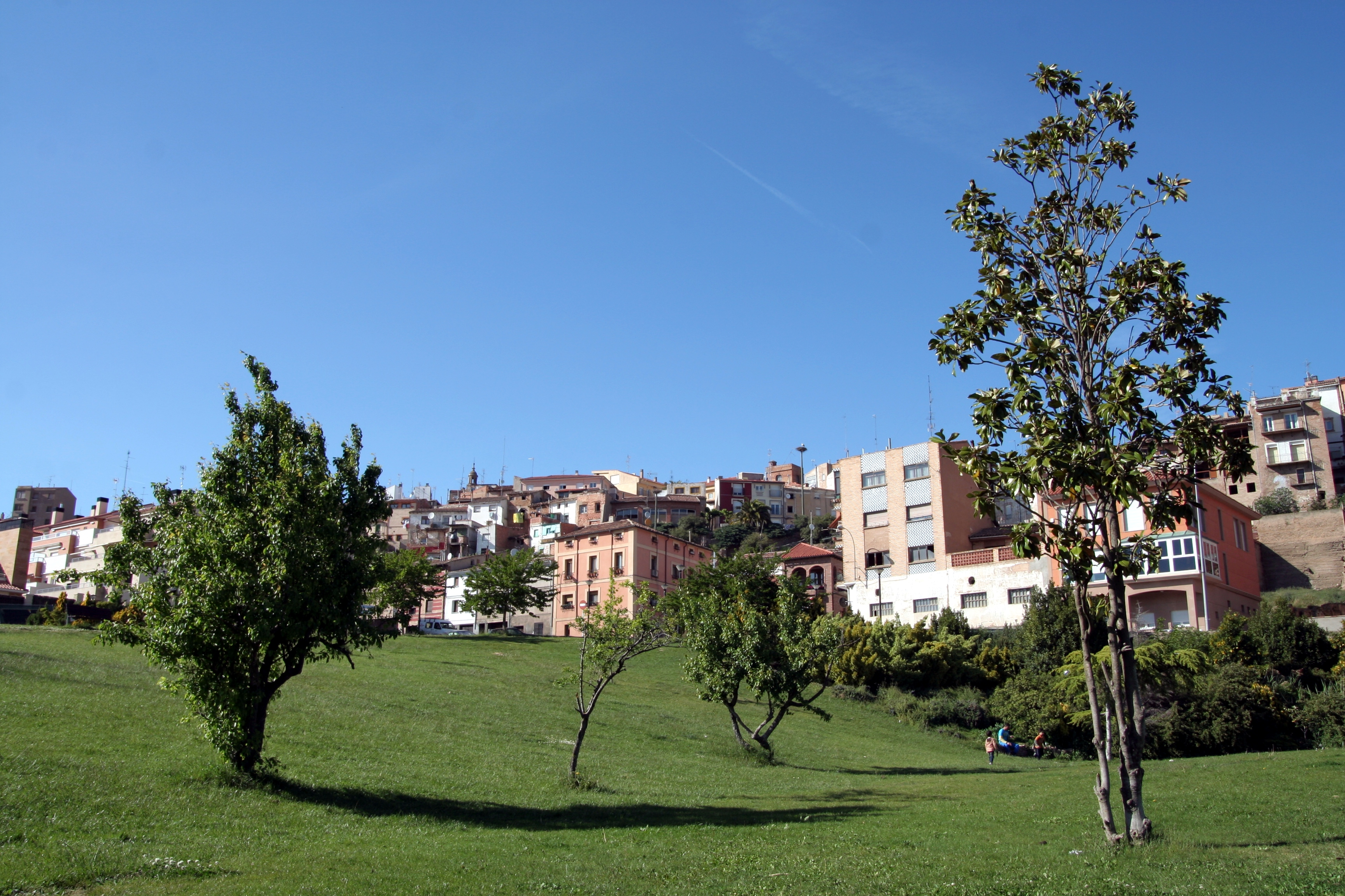 Calahorra vu du parc du Cidacos